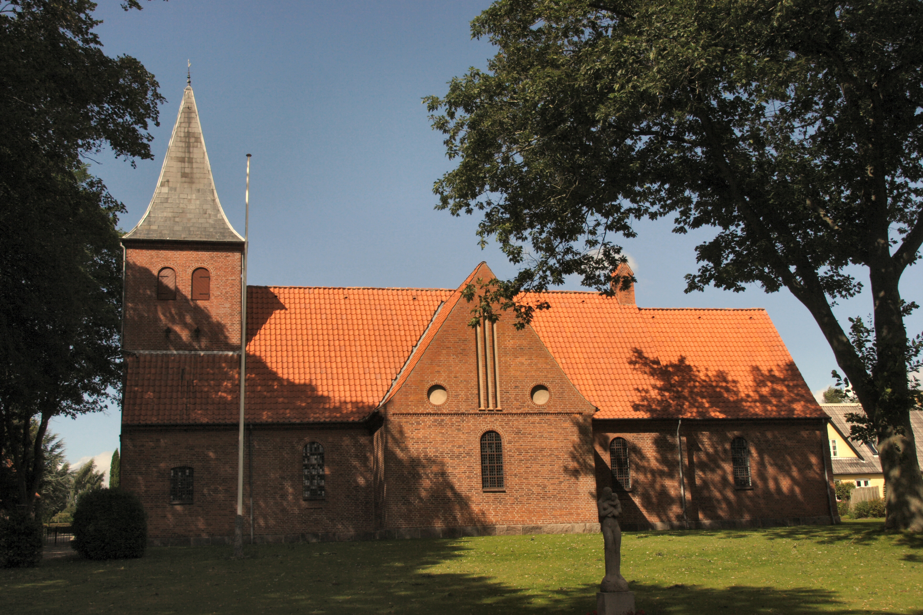 Valgmenighedskirken i Sønder Nærå